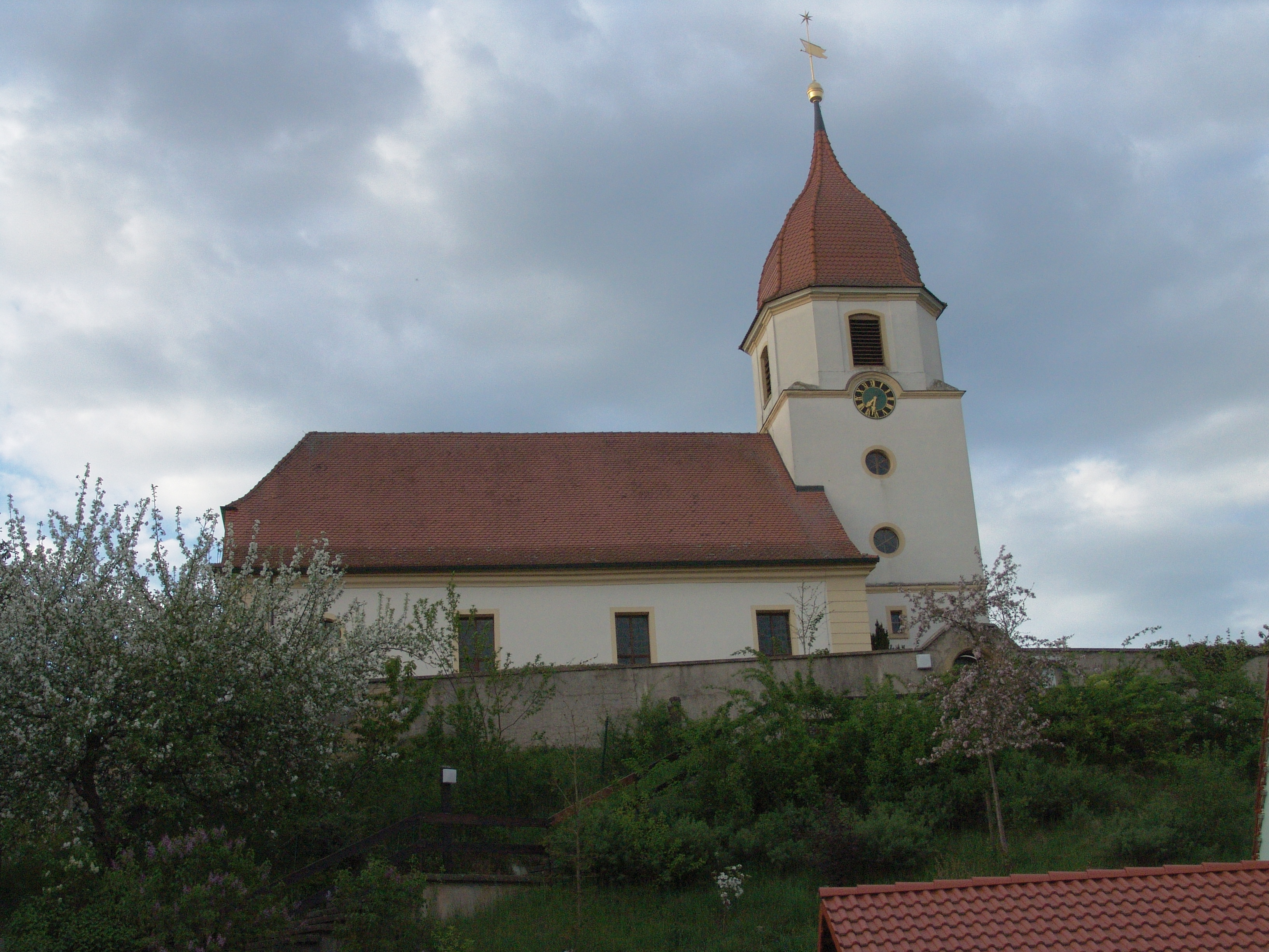 Evang-Luth. Kirche St. Nikolaus und Theobald in Altentrüdingen